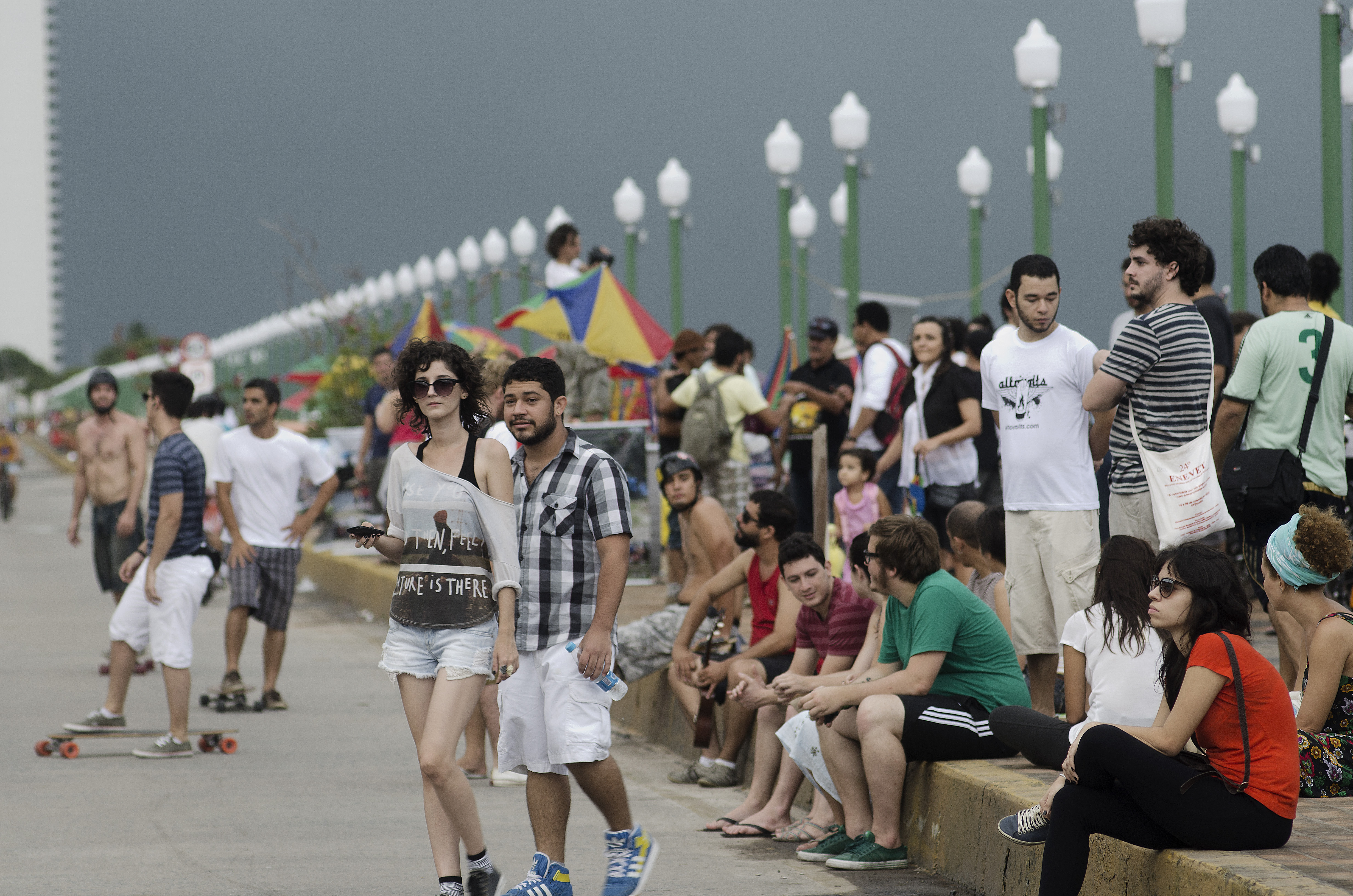 Protesto contra o modelo de desenvolvimento urbano representado pelo Projeto Novo Recife - Recife, Pernambuco, Brasil.